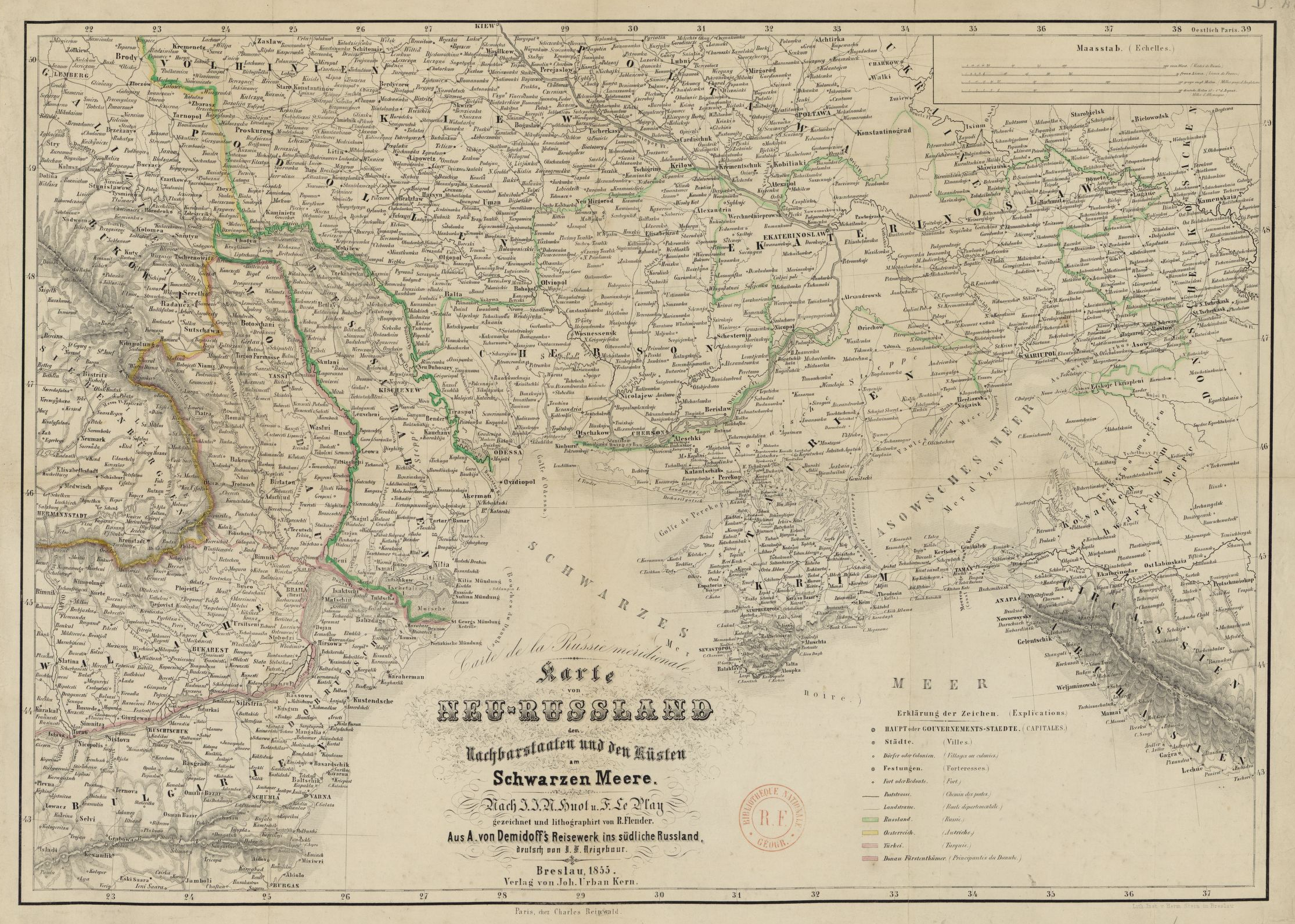 Karte von Neu-Russland, den Nachbarstaaten und den Küsten am Schwarzen Meere / Herausgeber: J. U. Kern (Breslau). 55 x 40 см. nach J. J. N. Huot ; und F. Le Play ; gezeichnet... von R. Flender, Aus A. von Demidoff's Reisewerke ins südliche Russland...